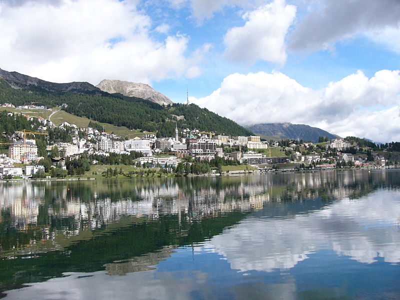 St. Moritz og innsjøen. Bilde fra 2006. Fotografert av bruker Bonza på italiensk wikipedia-artikkel om St. Moritz.